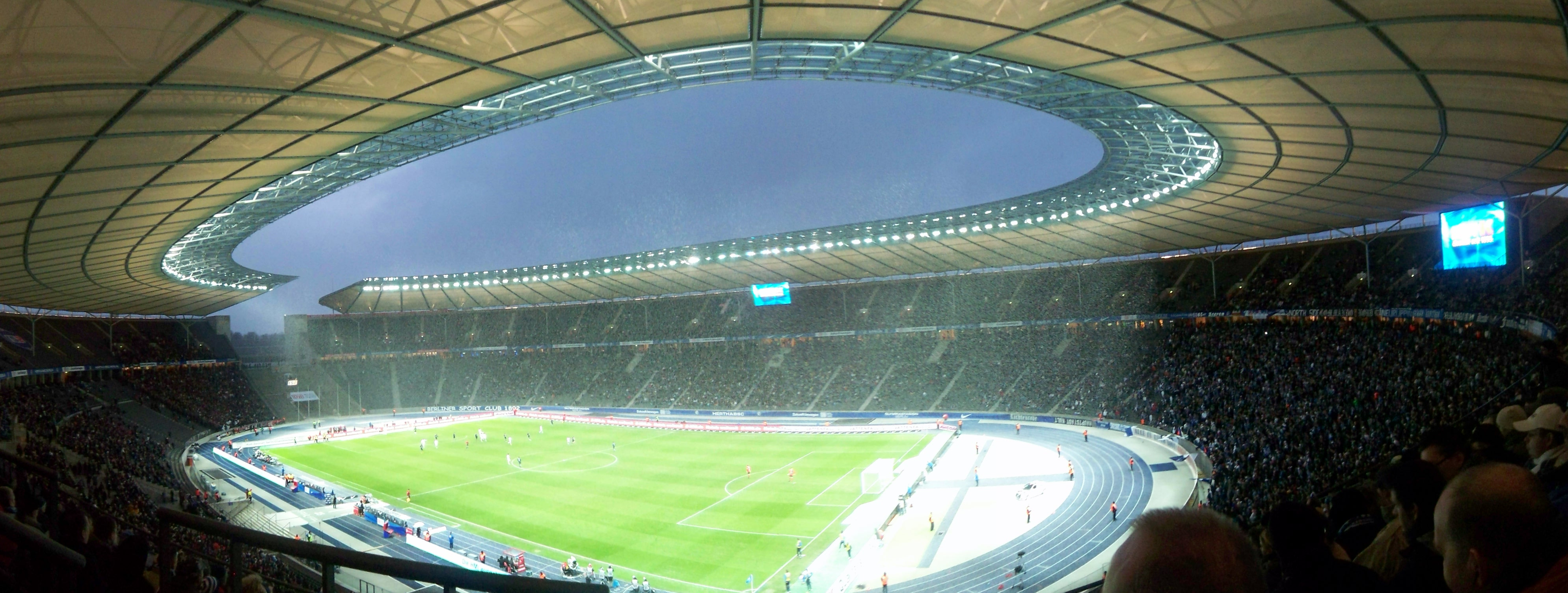 Das Olympiastadion beim Spiel Hertha BSC - Eintracht Frankfurt, Blick aus Block 3